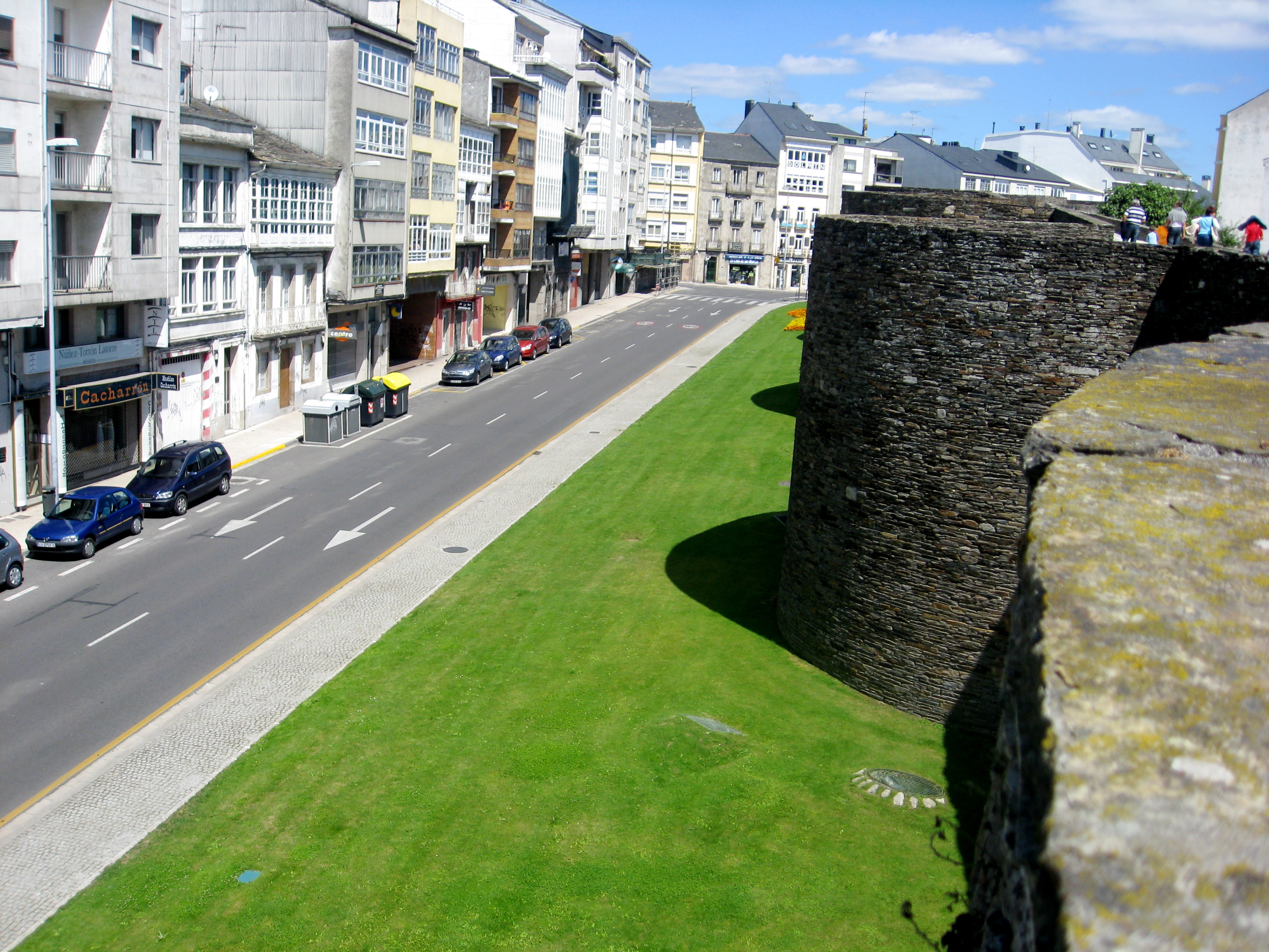 Muralha de Lugo